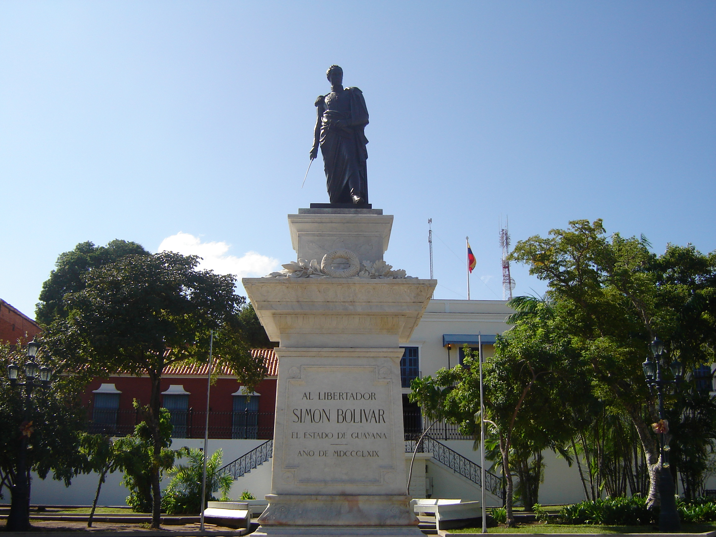 Bolívar Park - Ciudad Bolívar, Venezuela